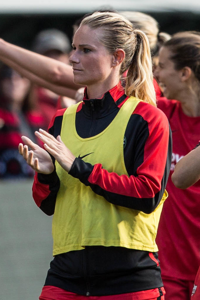 N42A3218.jpg